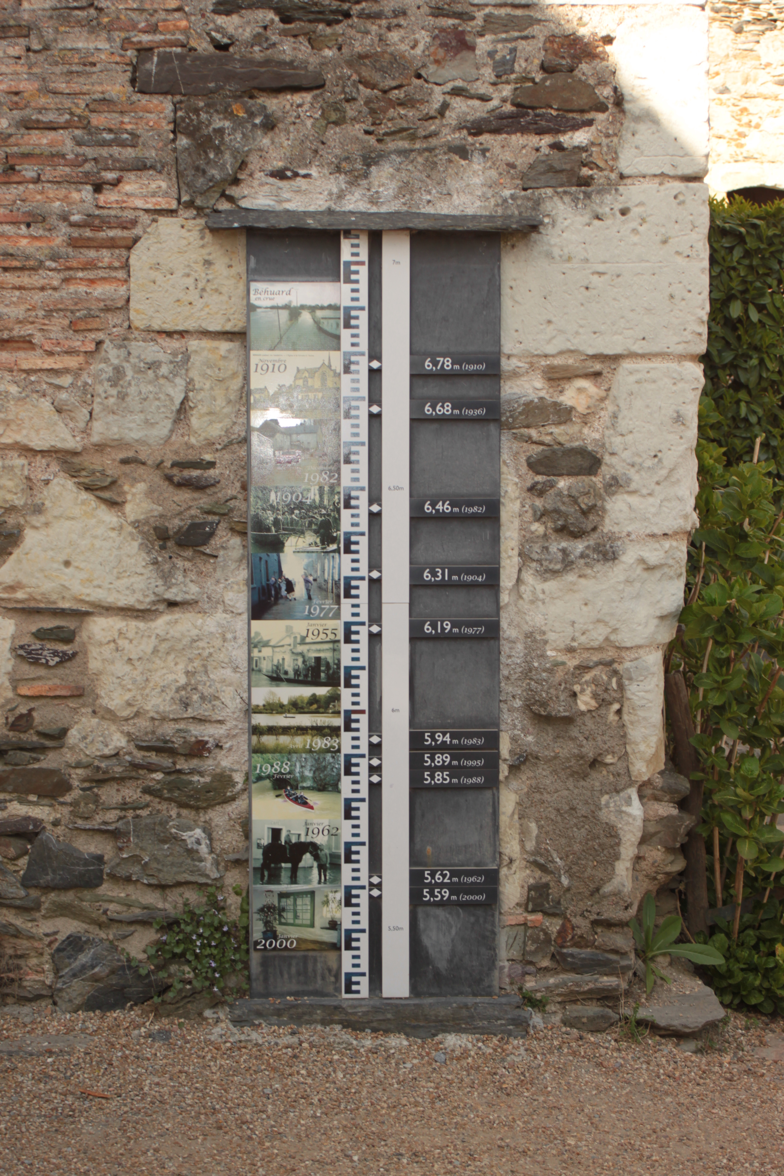 Jauge à crues, Fr-49-Béhuard.